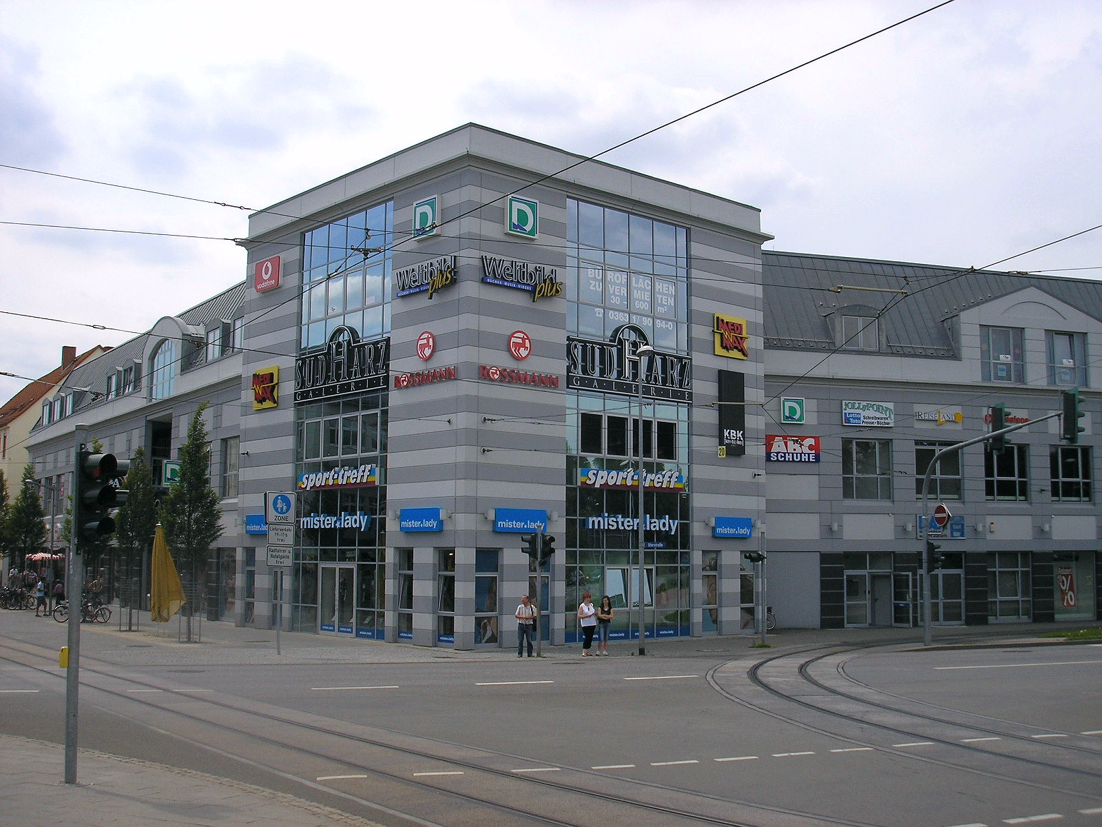 Einkaufszentrum Südharzgalerie in Nordhausen (Thüringen).